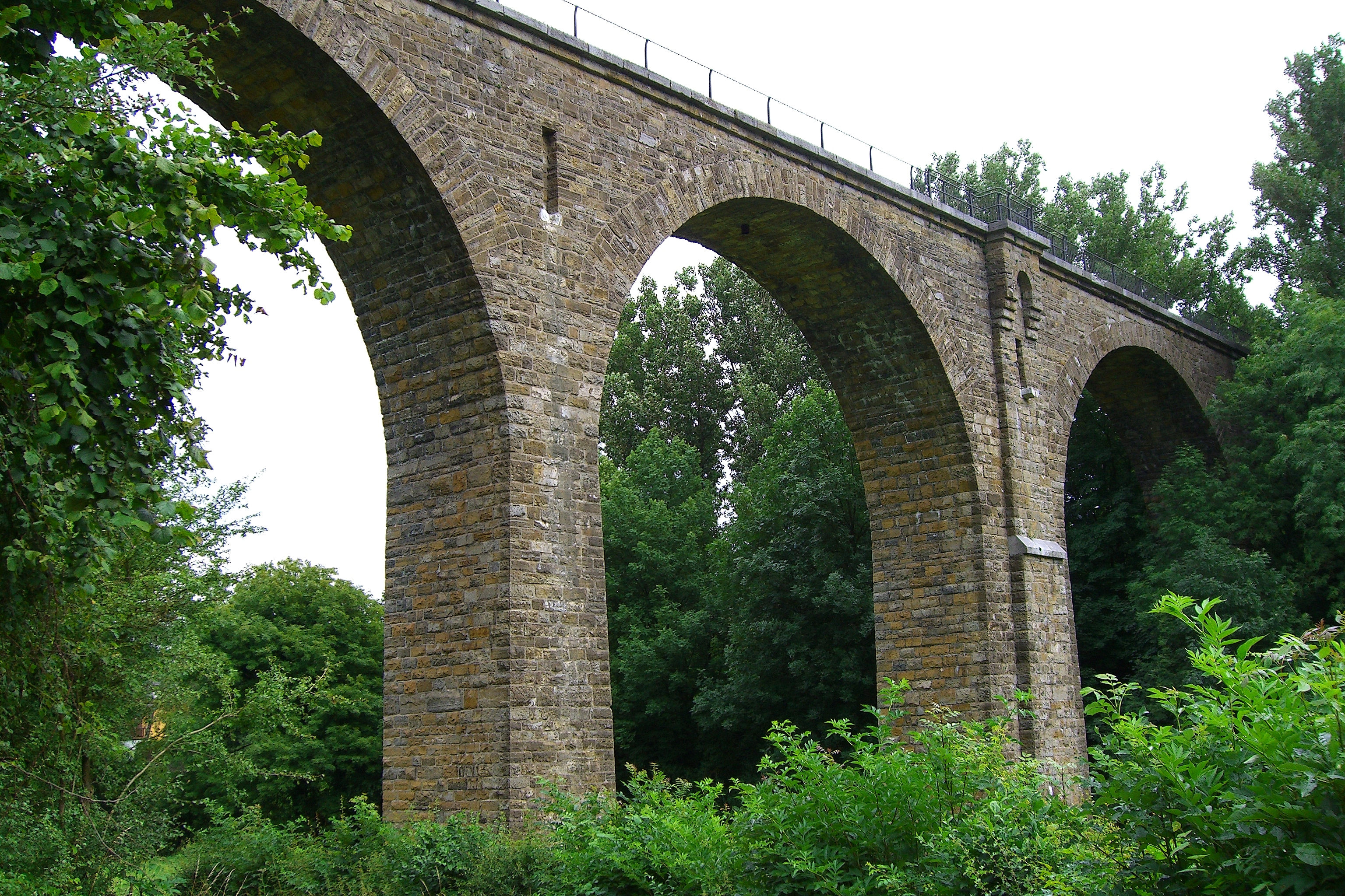 Itertalviadukt bei Kornelimünster